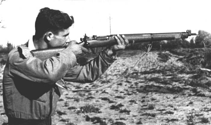 שלמה הניג מתאמן בירי במסגרת ארגון "ההגנה" 1944-6